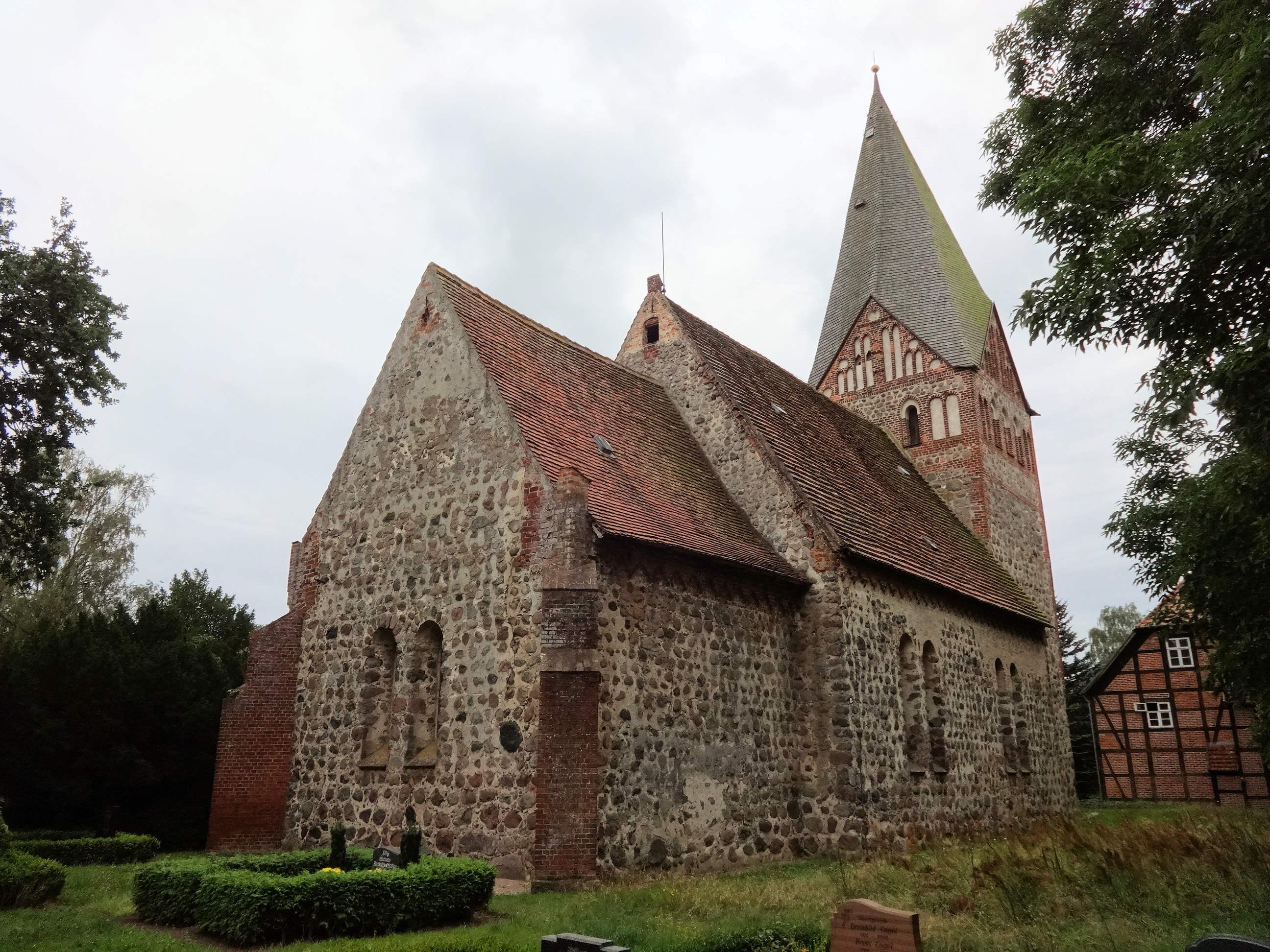 Feldsteinkirche in Zarnekow (Dargun) aus der zweiten Hälfte des 13. Jahrhunderts errichtet. Ende des 19. Jahrhunderts erfolgte ein Umbau durch Theodor Prüfer, von dem auch der Kirchturm entworfen wurde.